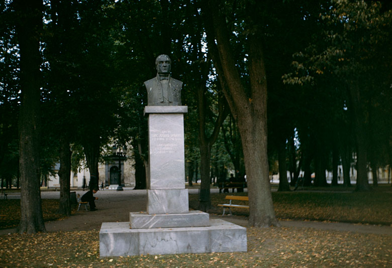 Byst av Greve Eric Josias Sparre (1816-1886) Ett verk av Carl Fagerberg, invigt 1936. Motiv: Vänersborg Nyckelord: Riksintressen Kategori: Minnesmärke, Stadsmiljö Byst av Greve Eric Josias Sparre (1816-1886) Ett verk av Carl Fagerberg, invigt 1936.